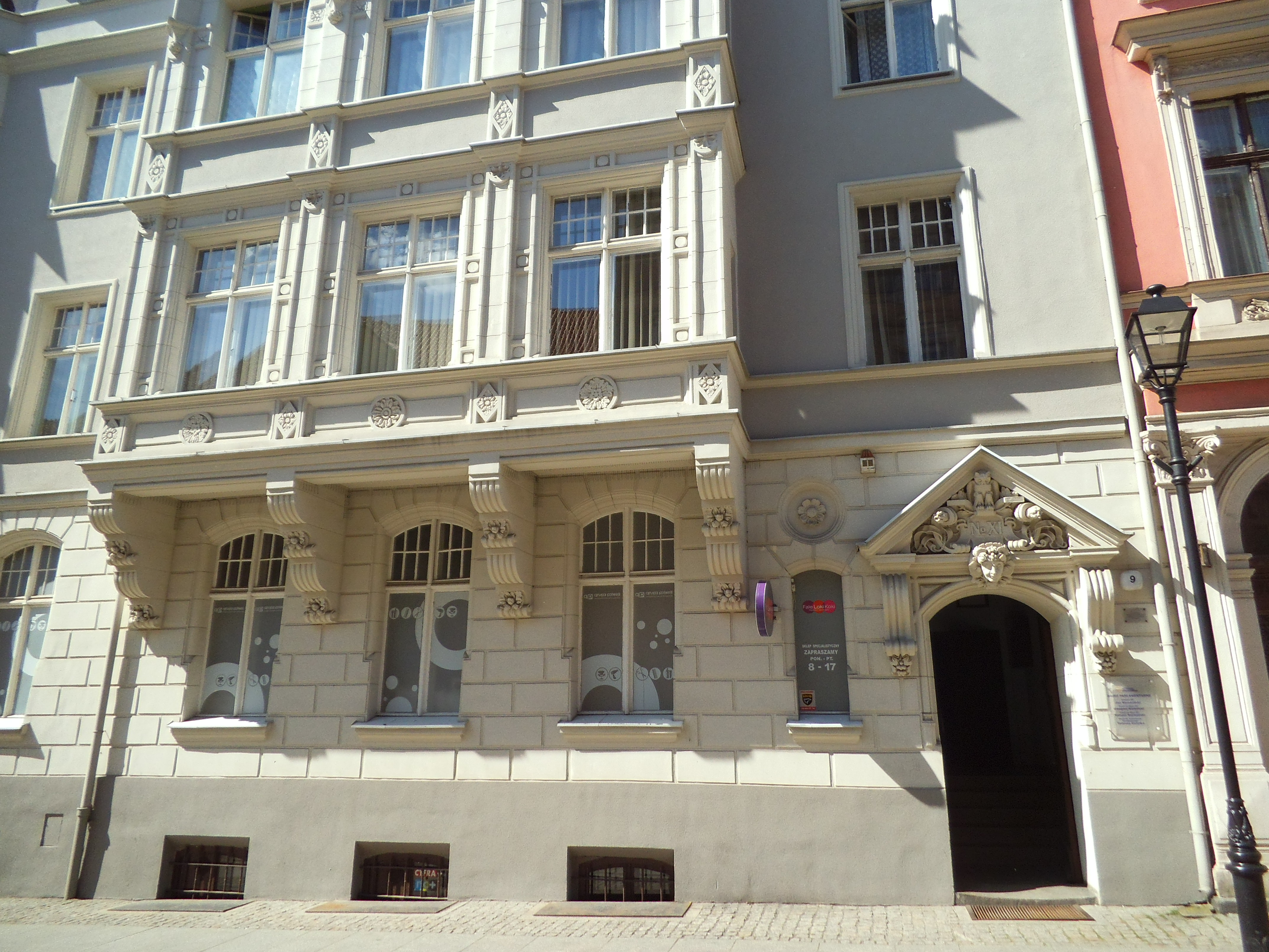 Zabytkowa kamienica przy ulicy Mostowej w Toruniu